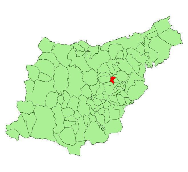 Localización de Anoeta respecto a la provincia de Guipúzcoa. es: Mapa localizador del municipio de Anoeta en la provincia de Guipúzcoa en: Anoeta municipality in the province of Guipuzcoa eu: Anoetako udal eremuak Gipuzkoa barruan